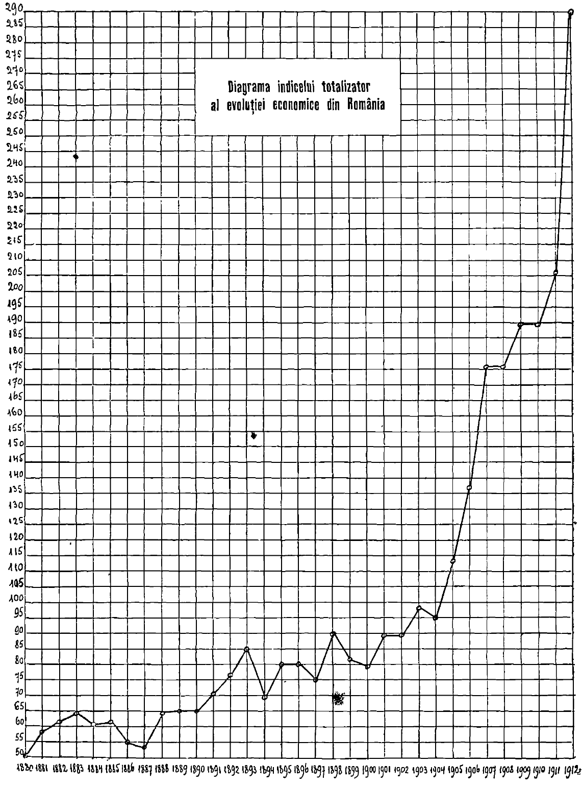 Graficul evoluţiei economice a României - 1886-1912